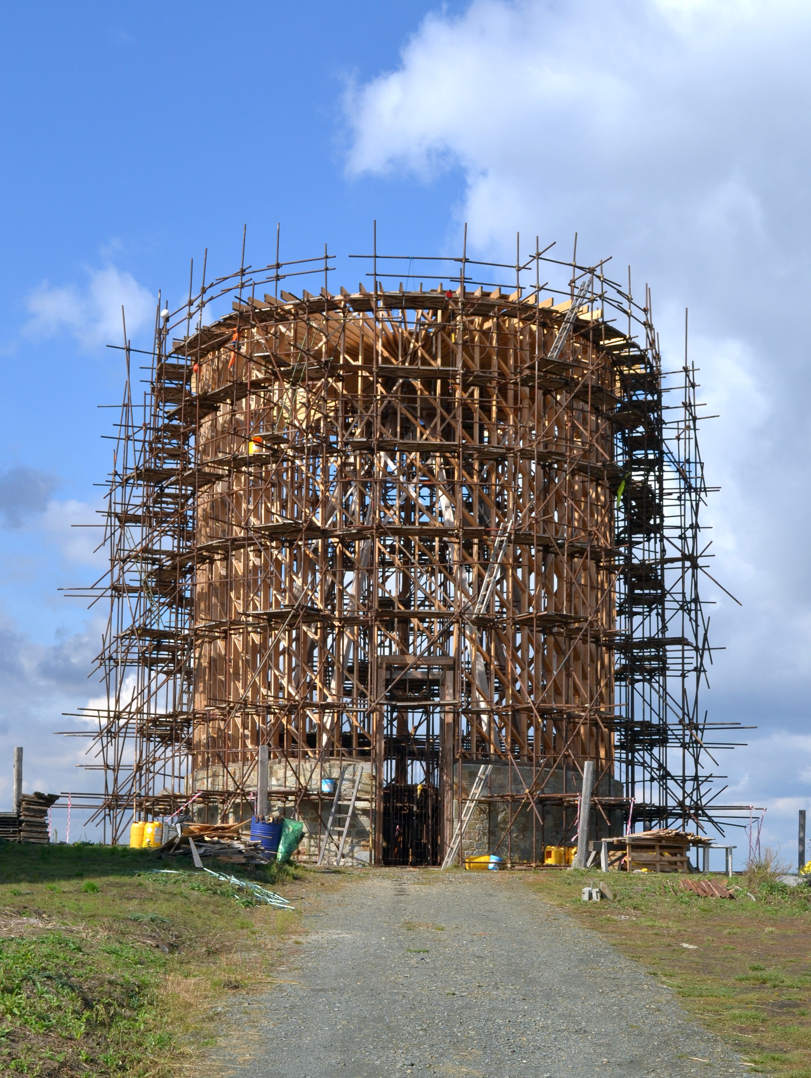 Nesvačilka - Kaple Panny Marie Bolestné, říjen 2019